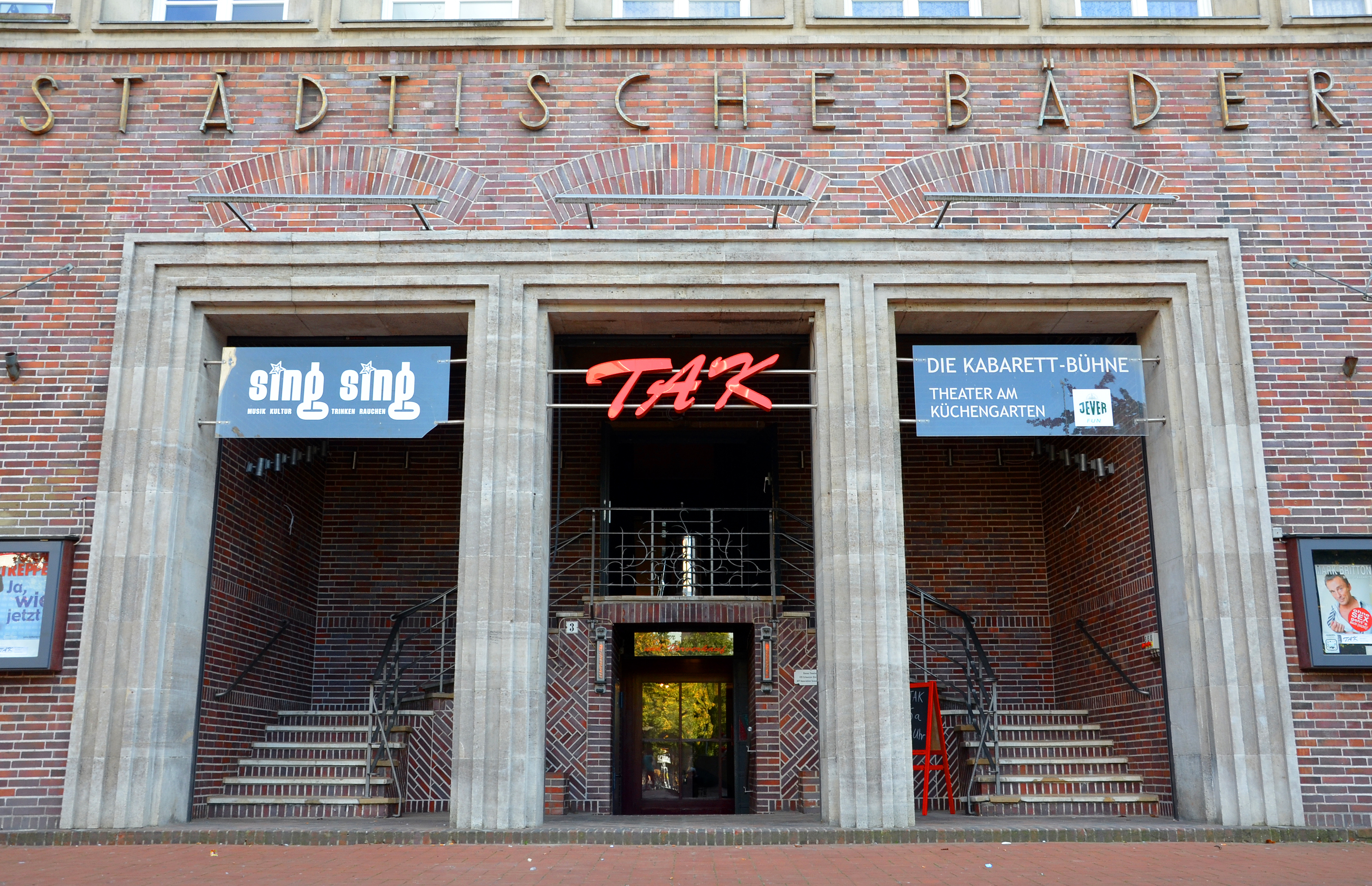 Impressionen vom und im Theater am Küchengarten (TAK) in Hannover, der Kabarettbühne im denkmalgeschützten Sockelgeschoss der 1927 unter Karl Elkart erbauten Städtischen Bäder in Hannover-Linden. Aus Zeitgründen wurde hier zunächst auf eine Einzelbeschreibung der Fotografien verzichtet; Details können Sie jedoch auch ohne Ihre eigene Arbeit schon jetzt aus dem jeweiligen Dateinamen entnehmen ...